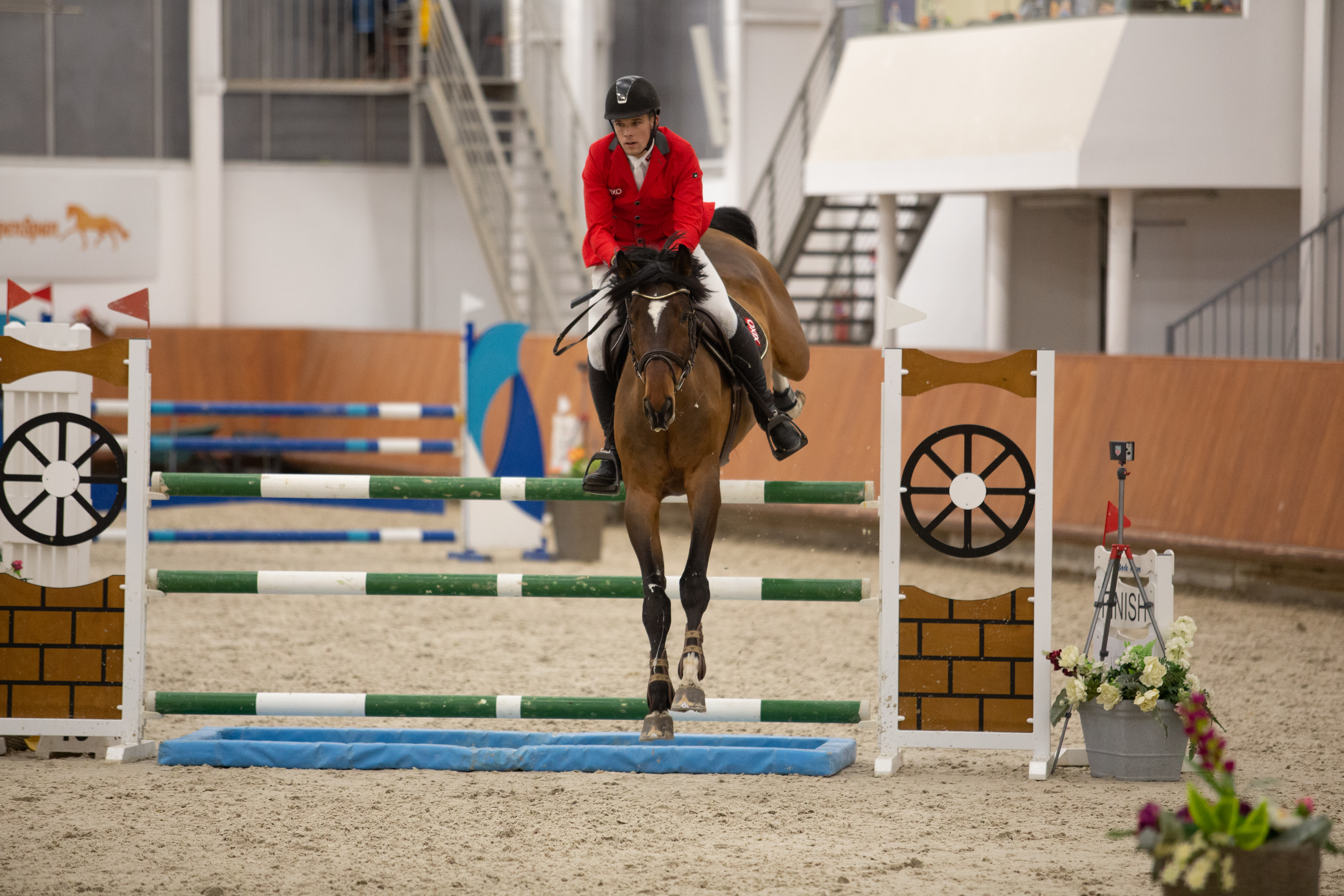 Szabó Gábor edzés közben